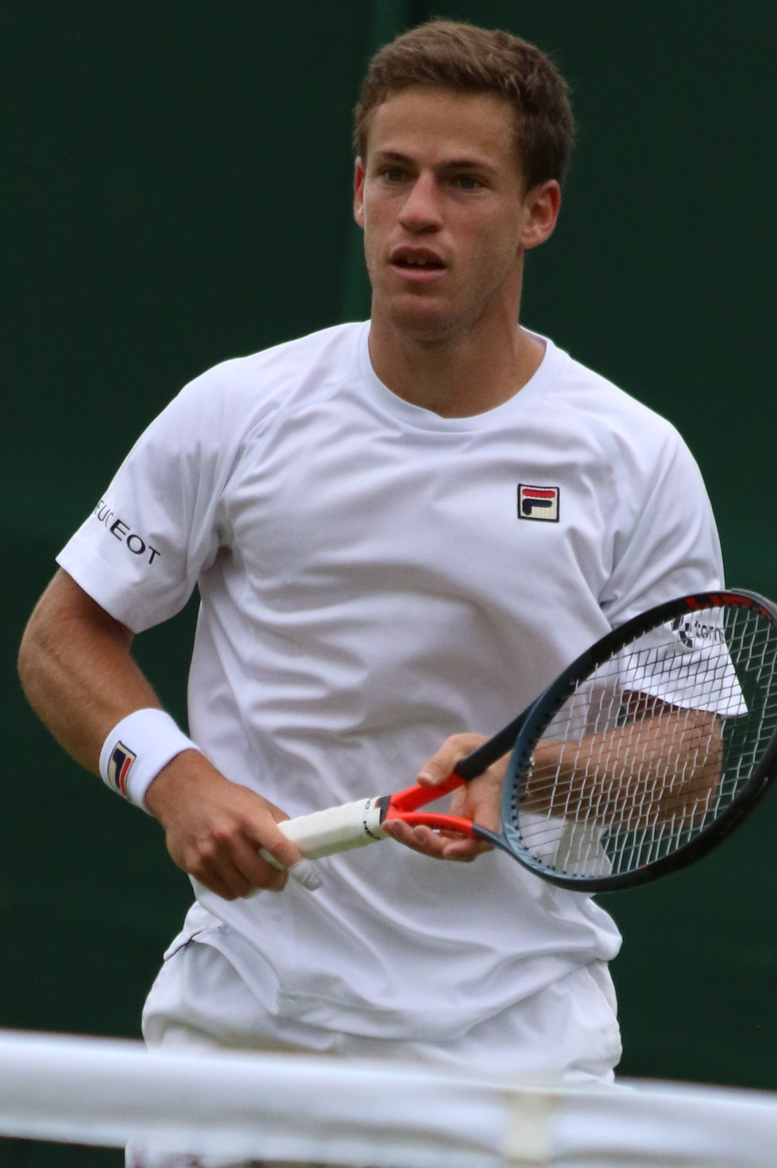 Schwartzman WM19 (24)